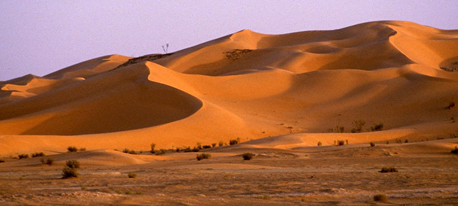 El Golea, in unmittelbarer Nähe der Stadt erheben sich die "Sandgebirge" des Westlichen Großen Erg.